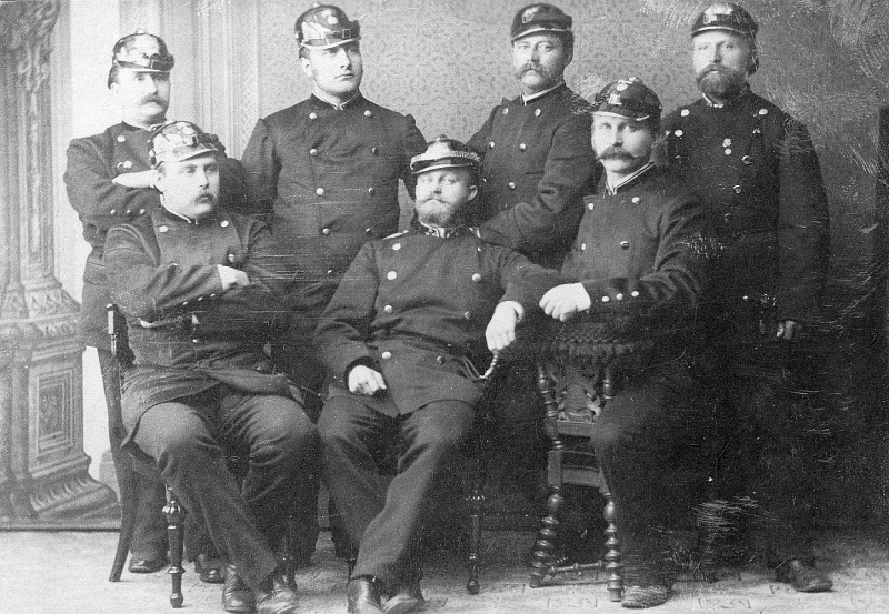 Aarhus Brandvæsen - i midten brandinspektør Eduard Ludvig Frederik Springborg